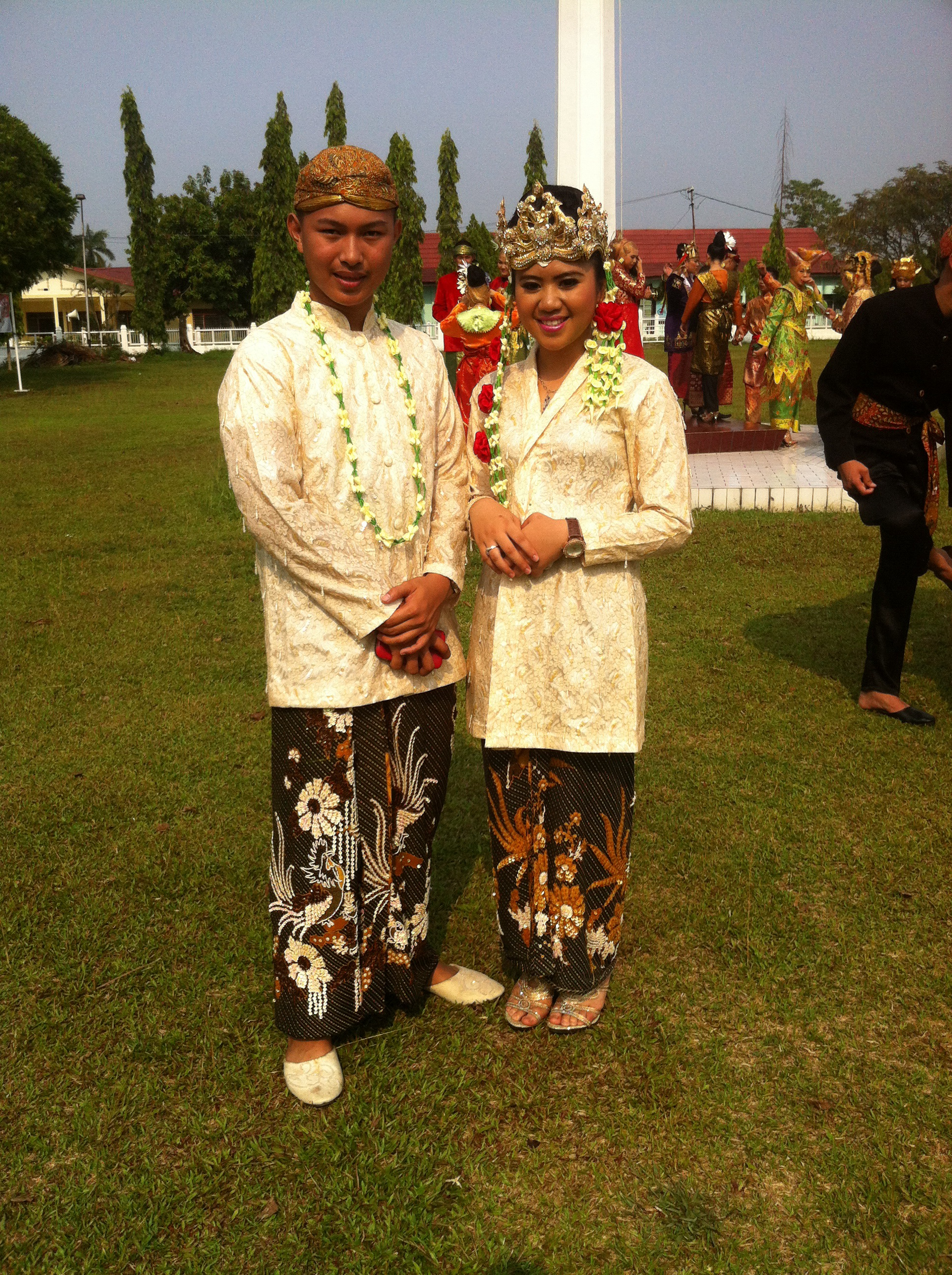 Baju Adat Jawa Tengah